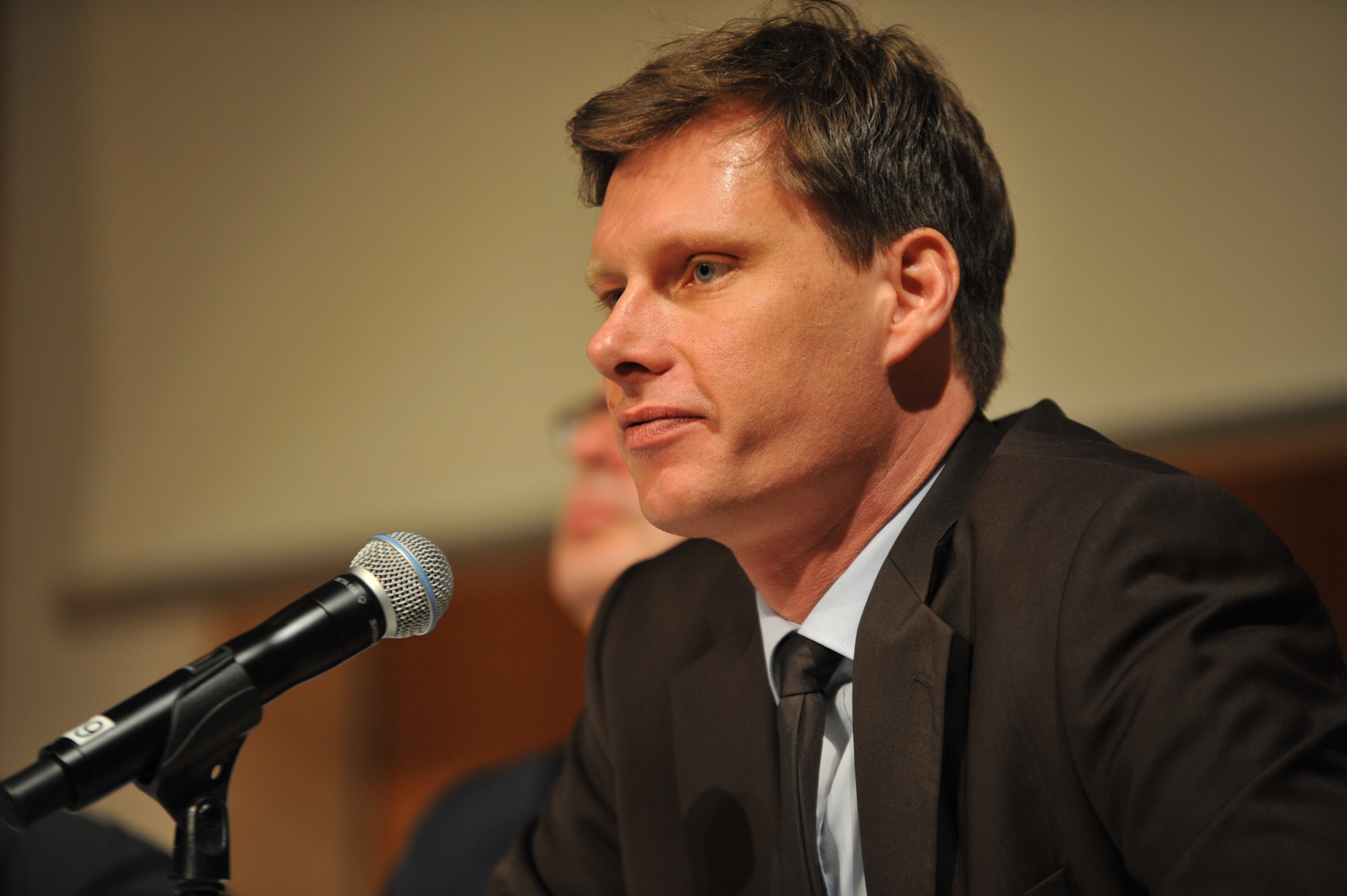 Markus Spieker, Referent beim Christlichen Führungskräftekongress 2013.